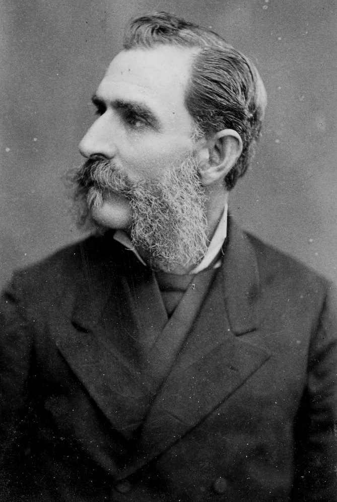 El presidente de la República del Ecuador, Luis Cordero Crespo, en el año 1883.